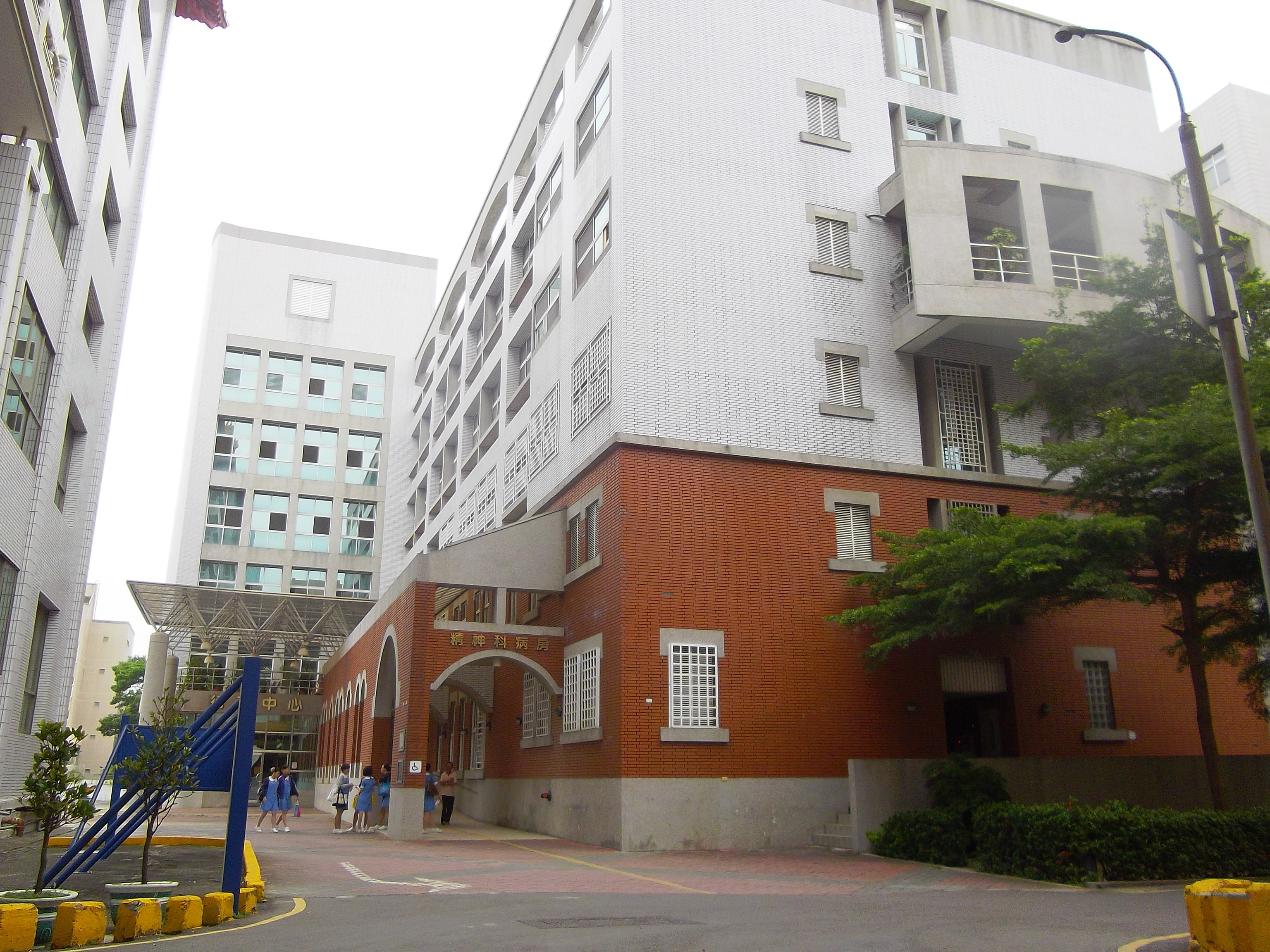 署立台南醫院精神科病房